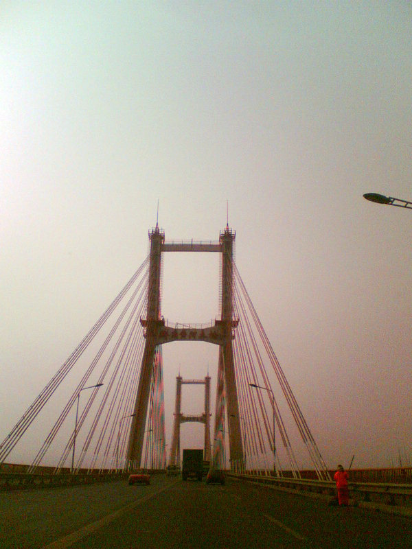 山东省济南市济南黄河大桥